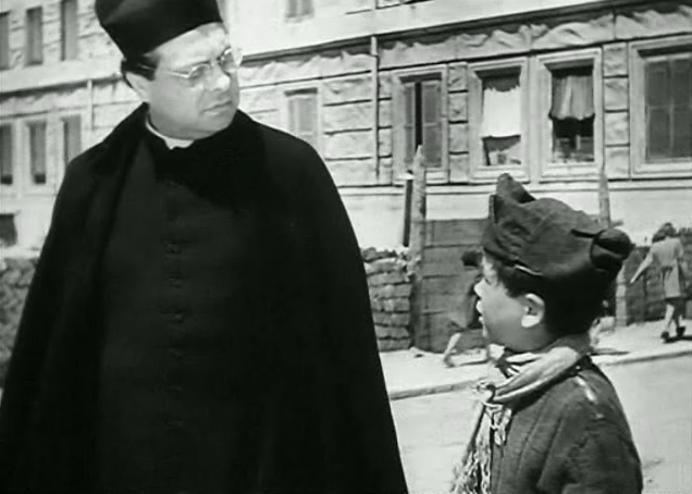 Screenshot dal film Roma città aperta.